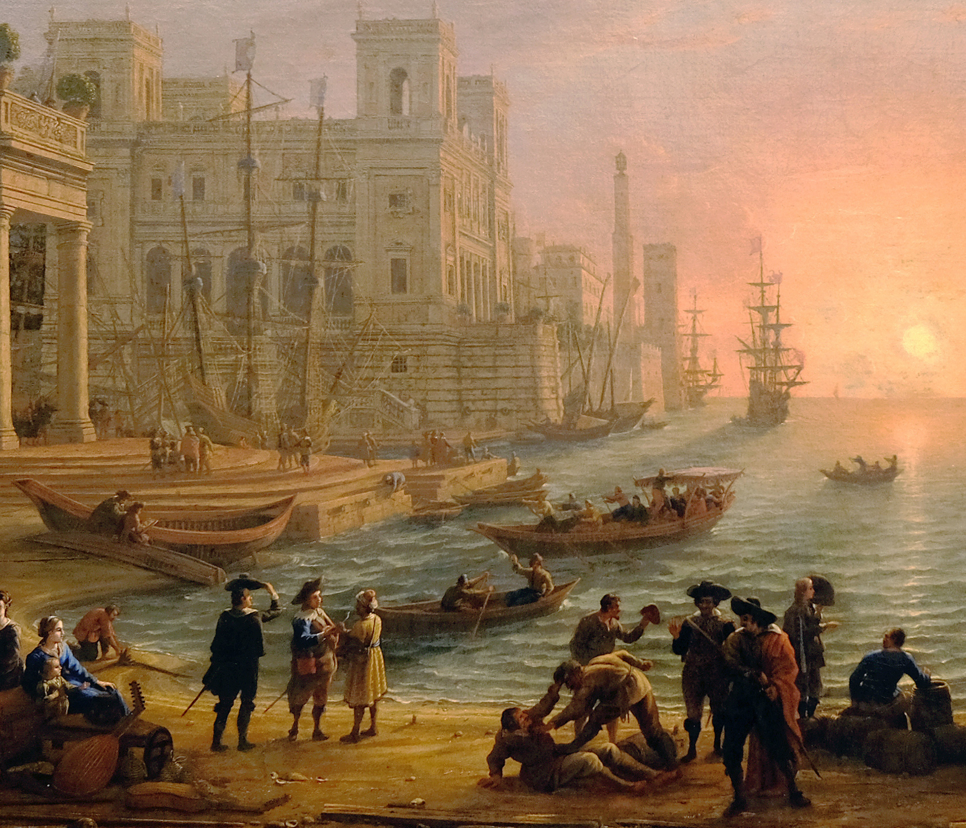 xcwxcwxcwxcwx